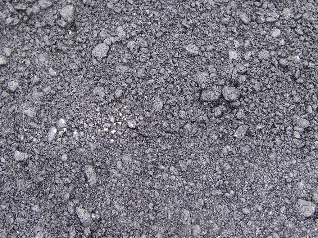 Frisches Asphaltmischgut